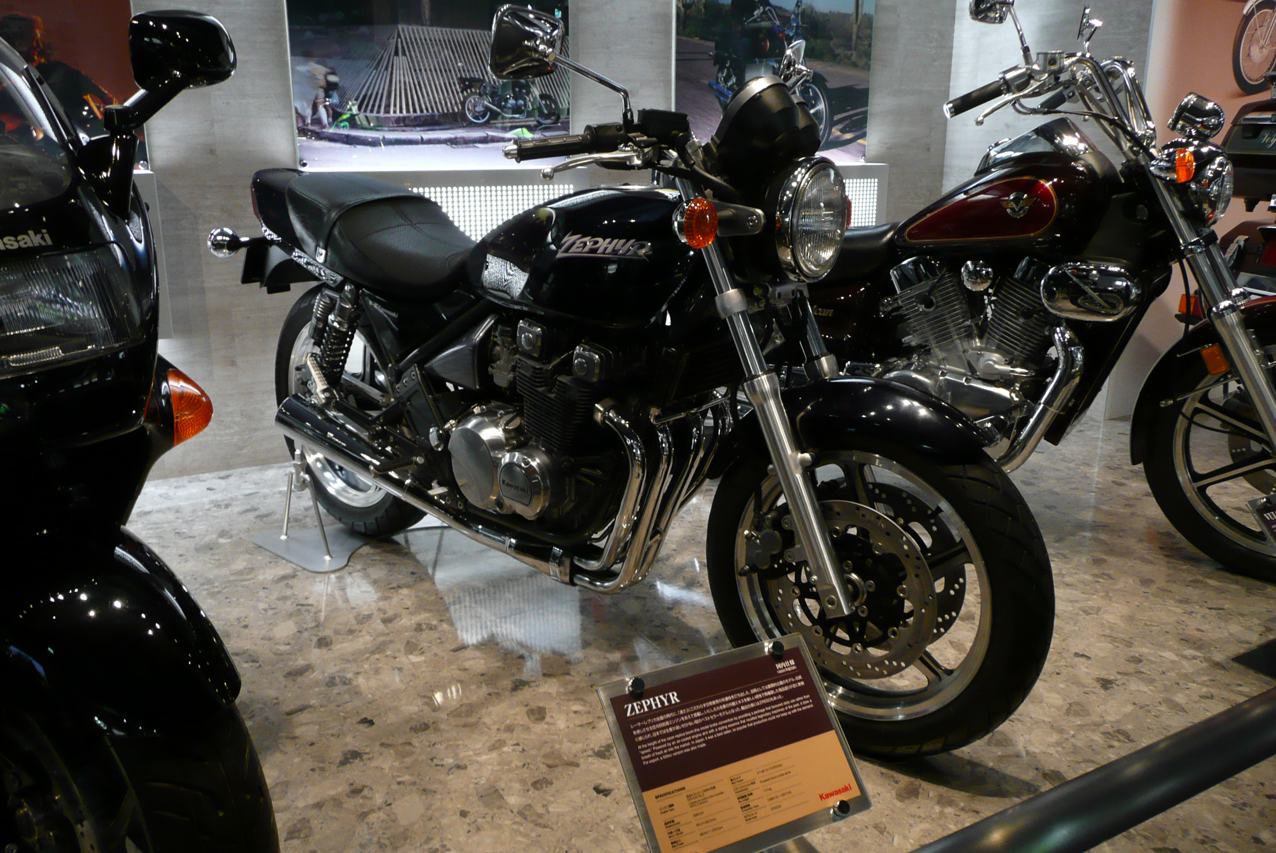 Kawasaki ZEPHYR（1989年・国内仕様） カワサキワールドにて撮影